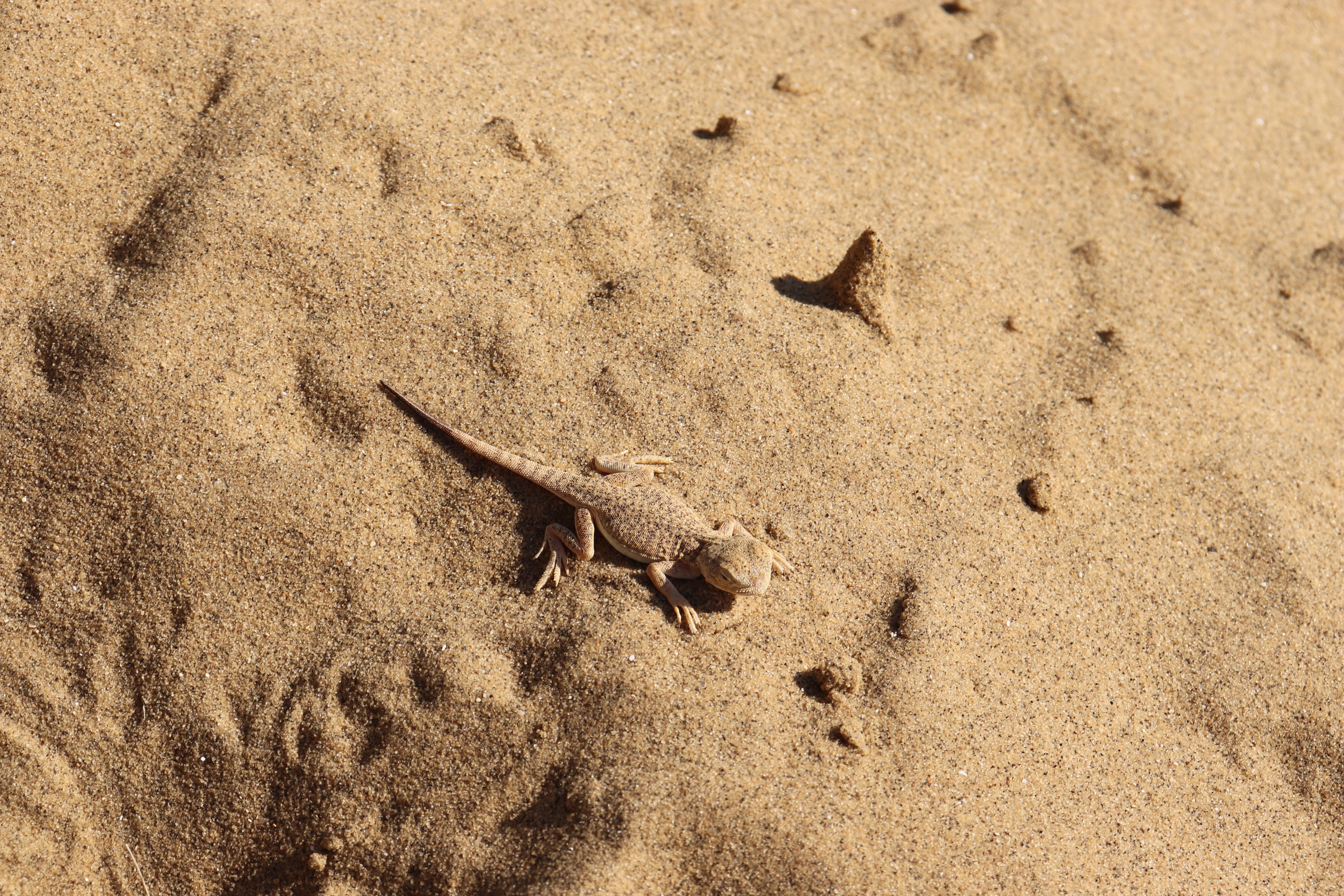 Песчаный бархан Сары-Кум: на территории государственного природного заповедника 'Дагестанский', Кумторкалинский район, Дагестан This image is related to the protected area of Russia number 0510023